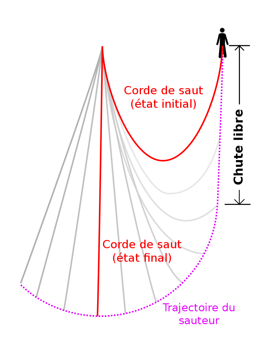 Schéma d'un saut pendulaire avec trajectoire de saut